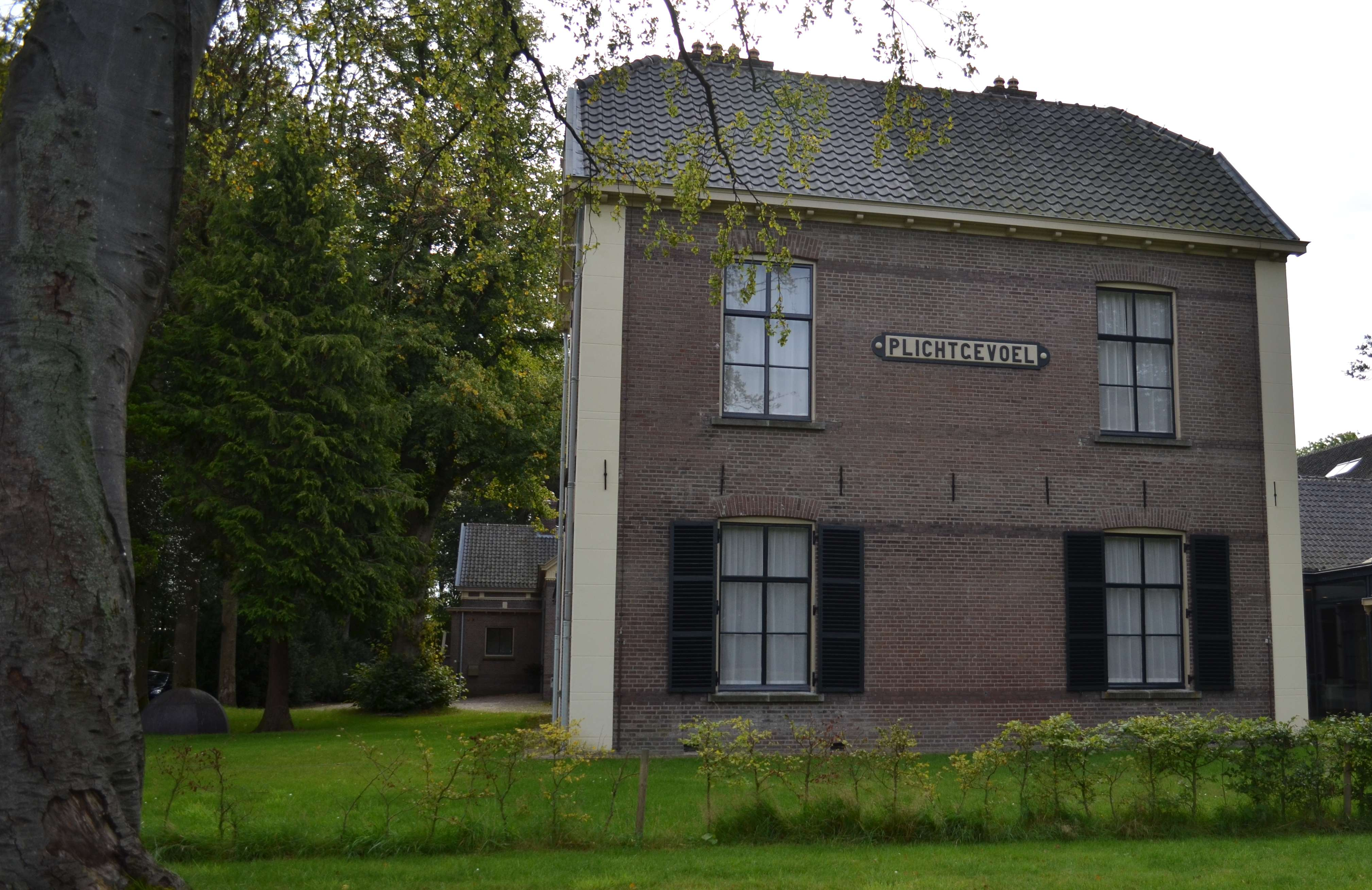 Rijksmonument "Plichtgevoel" (apothekerswoning), Hospitaallaan 24, Veenhuizen